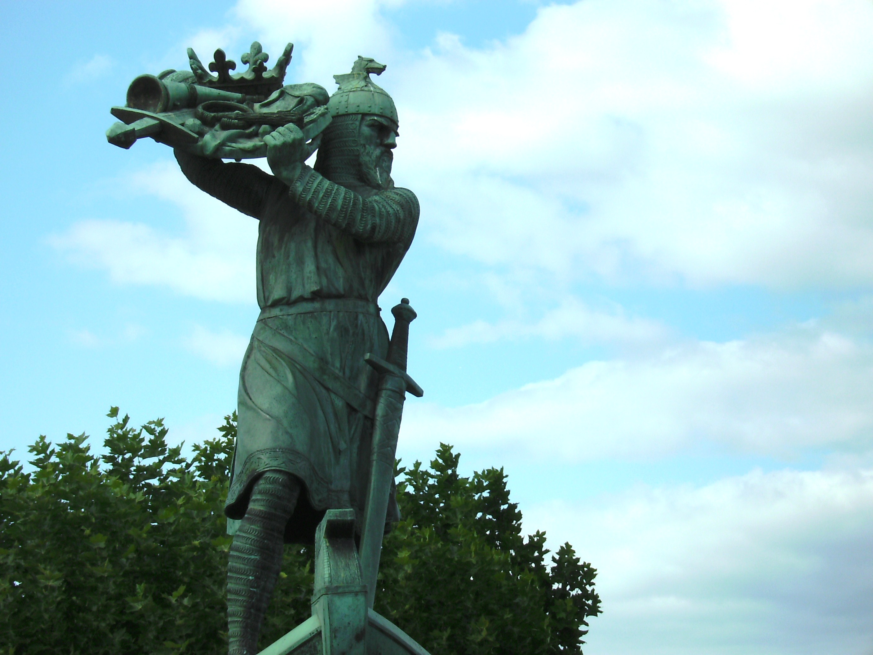 Hagen von Tronje versenkt den Nibelungenschatz im Rhein. Bronze-Plastik von Johannes Hirt (1905). Standort: Worms, Rheinufer.